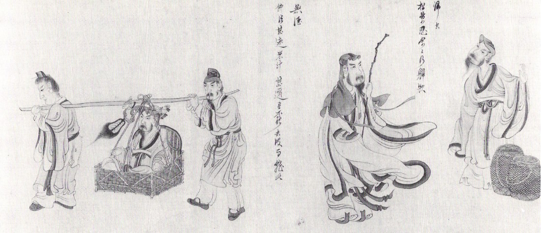 Retour au foyer, détail rouleau portatif, encre et couleur claire sur soie, daté 1650. du peintre chinois Chen Hongshou. (1598-1652). (Acquisition, 1954).